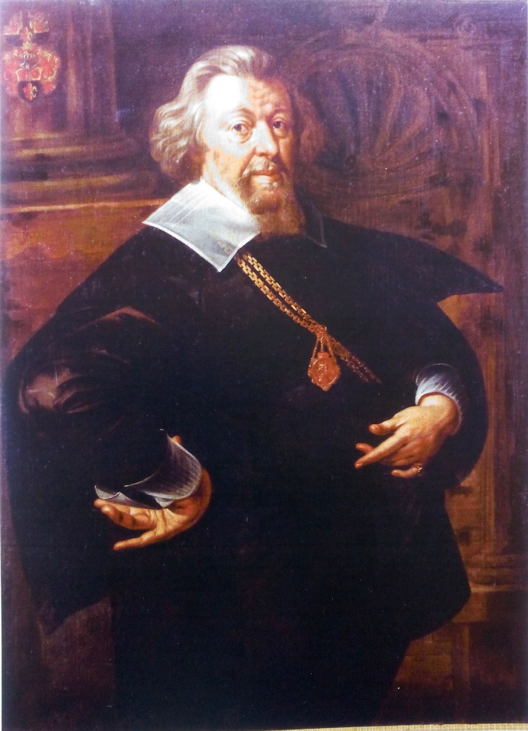 Henri André, baron de Gail